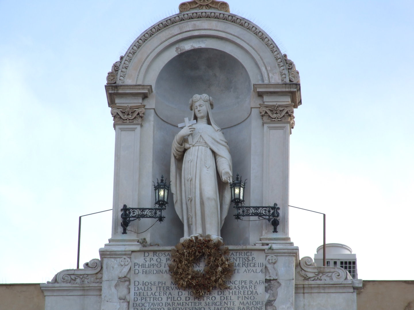 palermo catania catane siracusa syracuse brucoli augusta ognina acicastello acitrezza volcano vulcano etna sicilia sicily italia italy nature sea beach sun summer town city light landscape free europe europa eu wallpaper michael castielli resolution vacation holiday travel flight Creative Commons CC0 CC Zero panoramio flickr google GNU